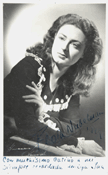 Flora Nudelman, pianista argentina, fotografiada por Annemarie Heinrich en 1949, con dedicatoria a Ina.